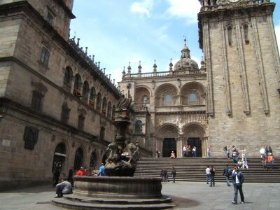 Santiago Compostela Cathedral april 2005